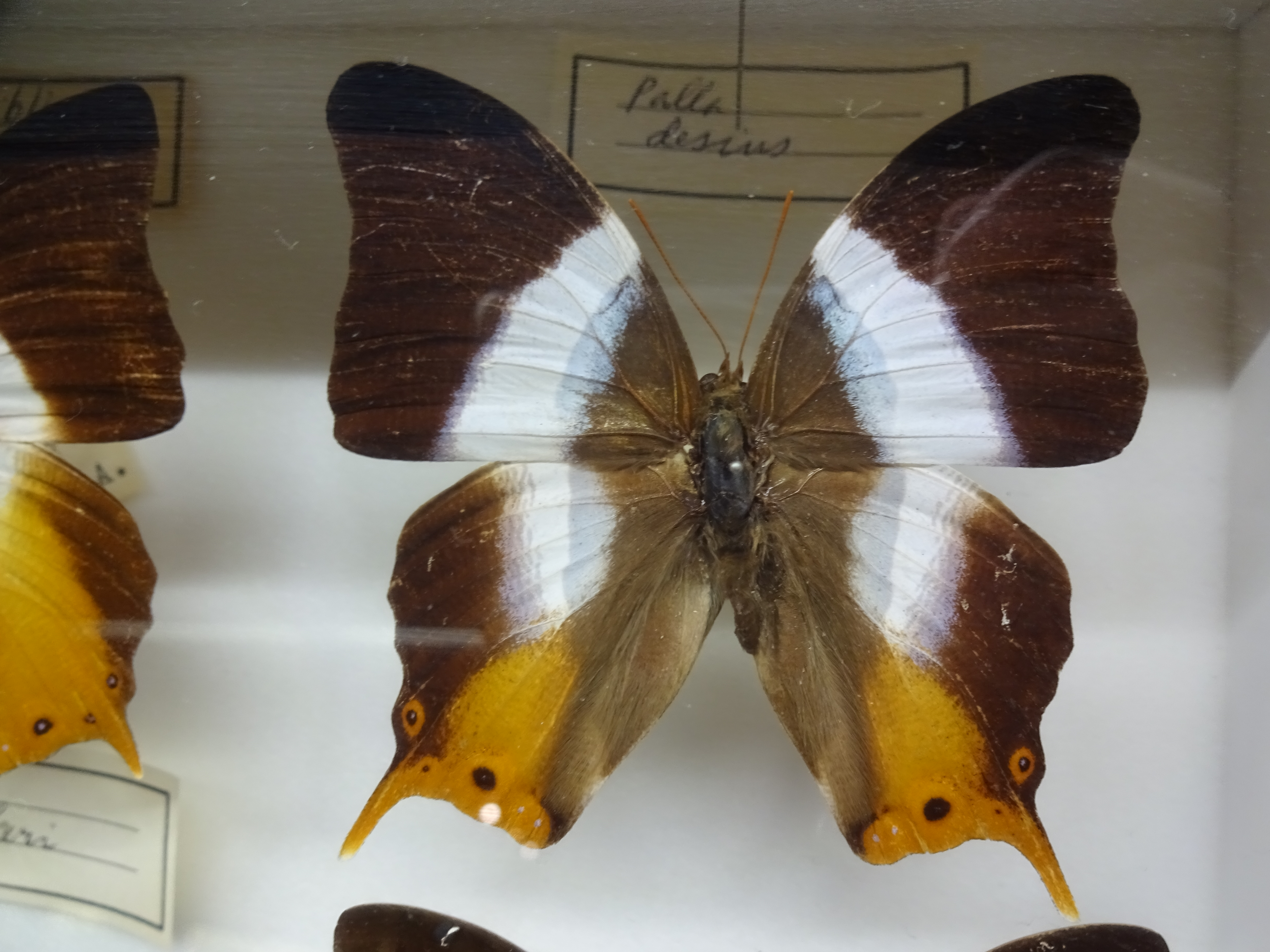 Palla decius